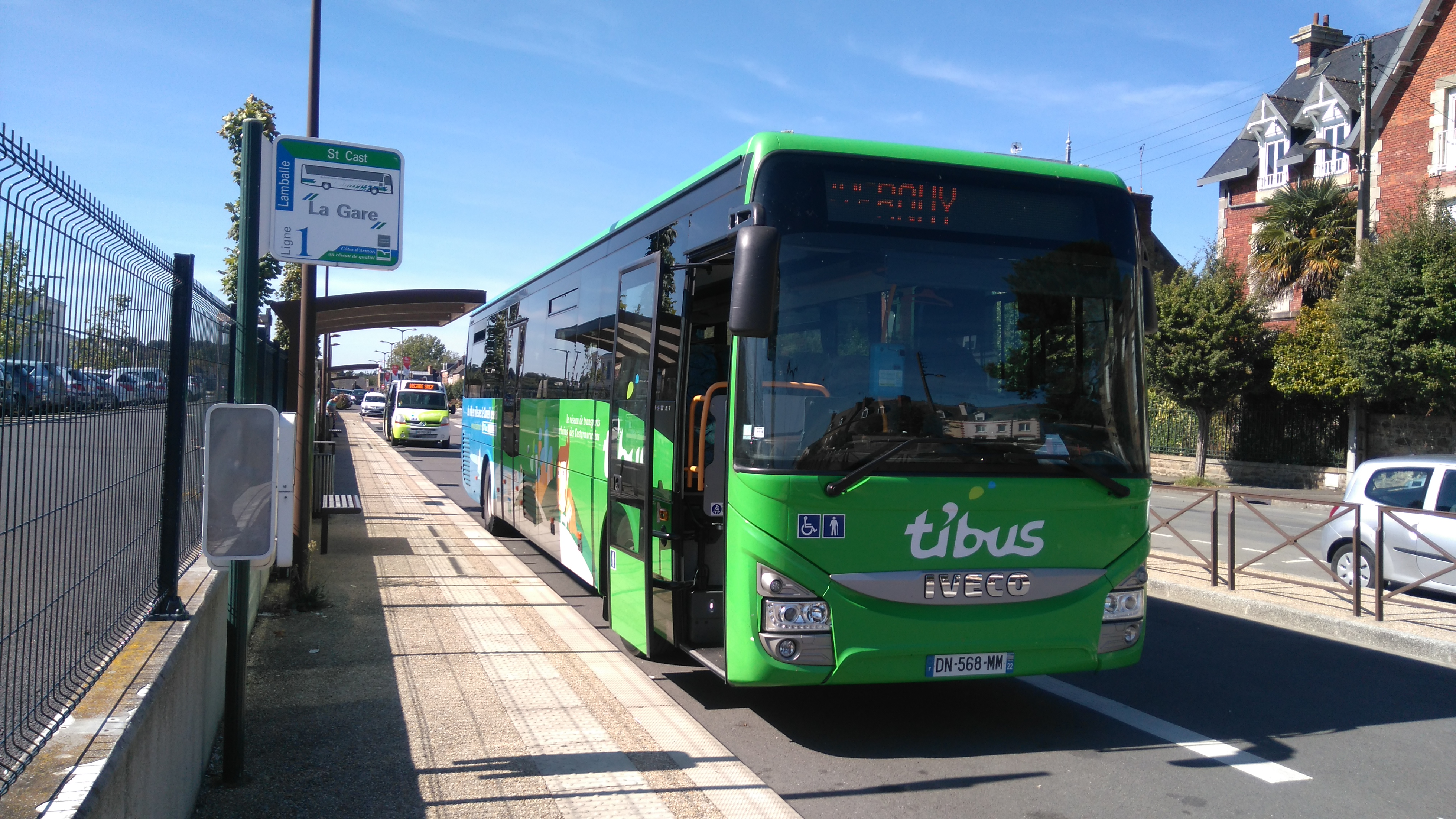 Iveco Bus Crossway Line 13 - Ti'Bus